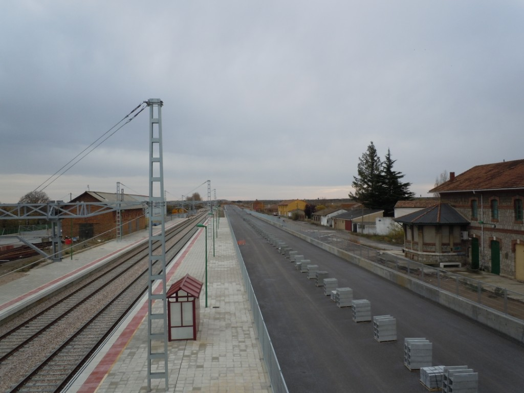 Obras en la estación de Palanquinos.